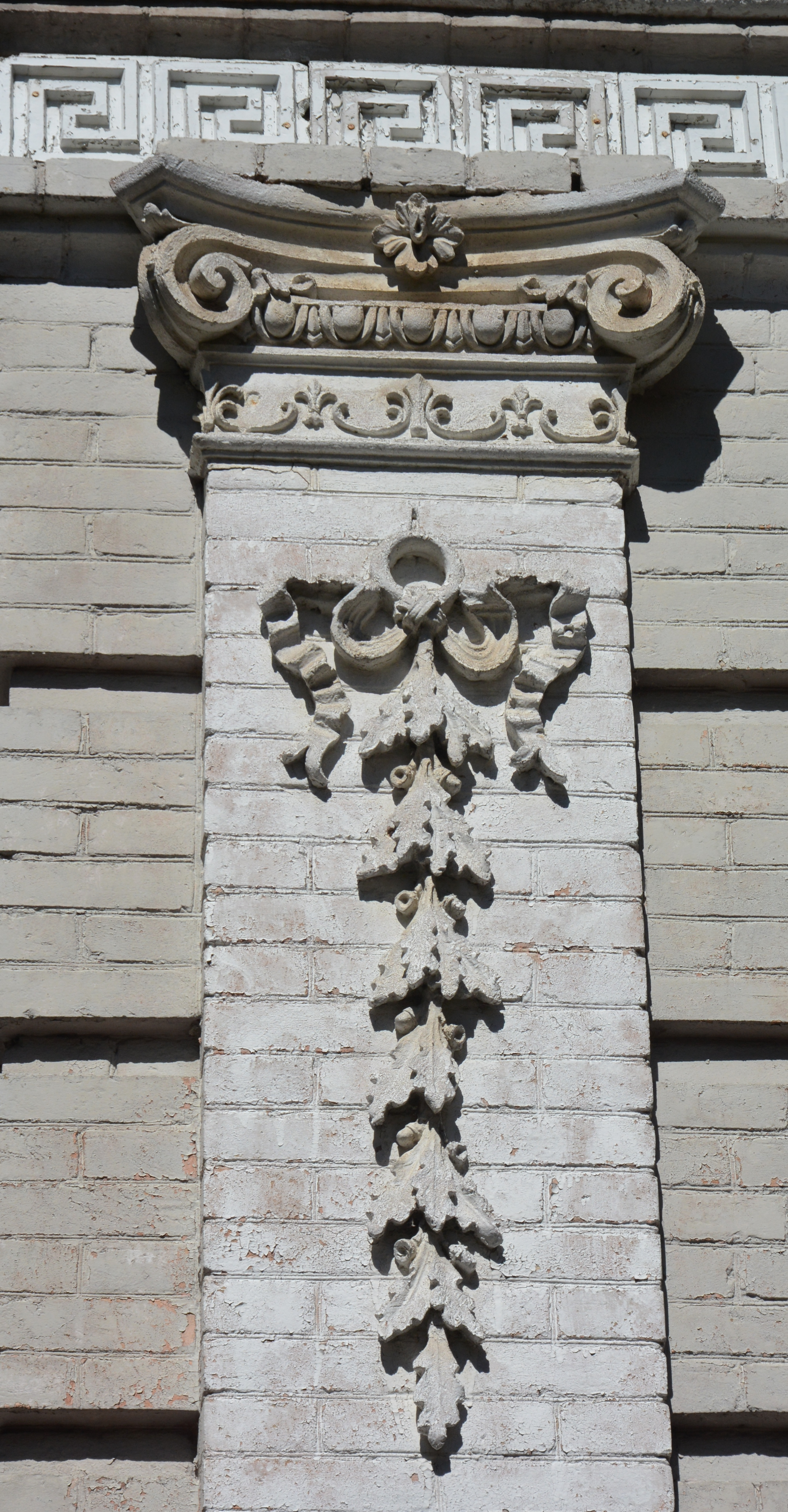 Будинок купця Чуркіна, Кременчук, Вул. І. Приходька, 43/13